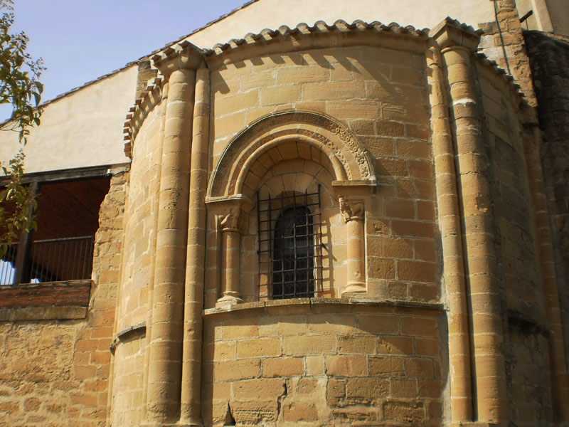 Abside románico burebano de la Ermita de Junquera (La Rioja)